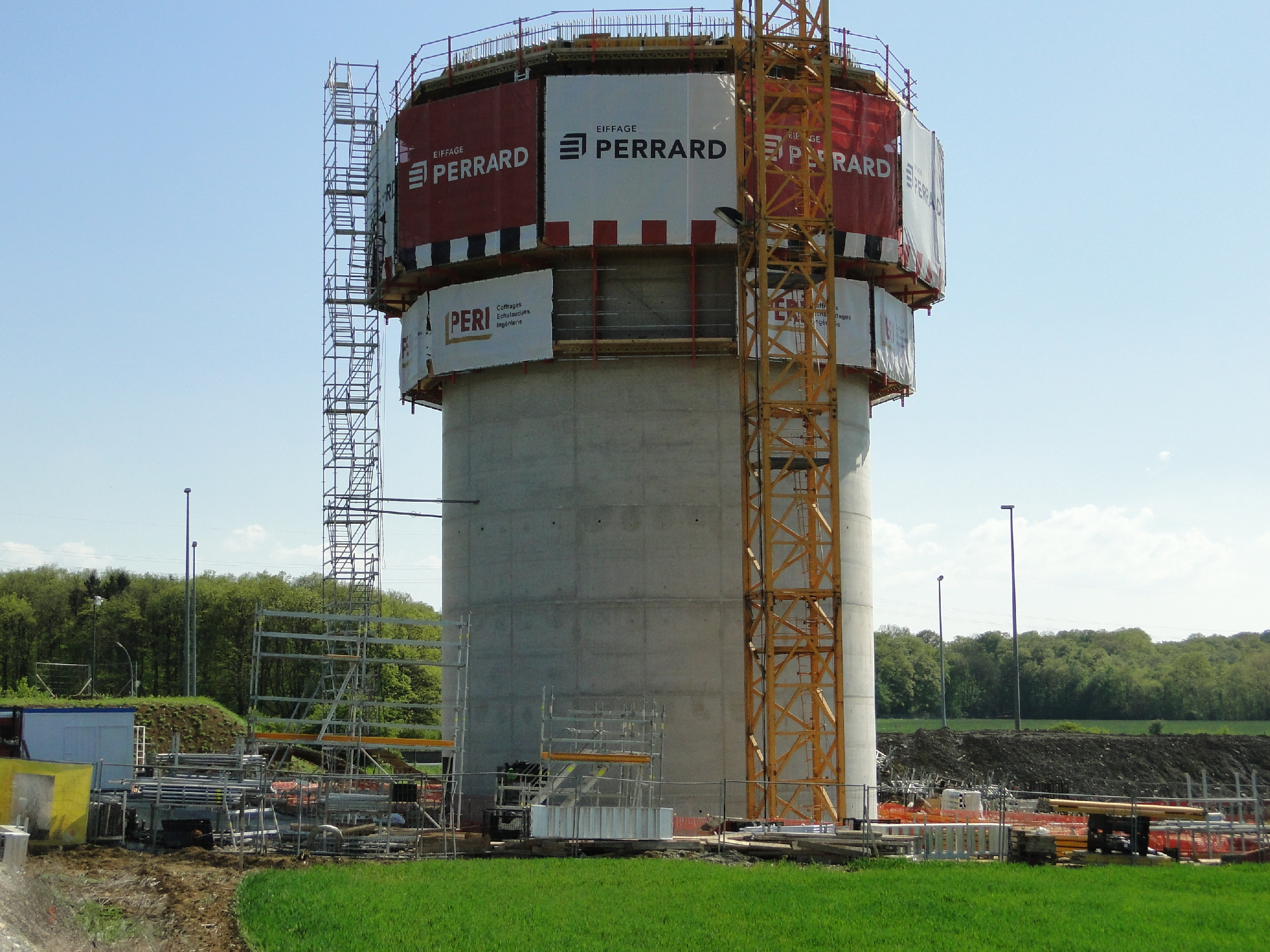 Construction d'un château d'eau d'une hauteur de 60m au Ban de Gasperich à Luxembourg.